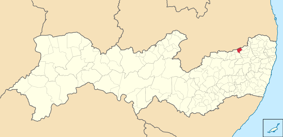 Mapa de Casinhas (2)